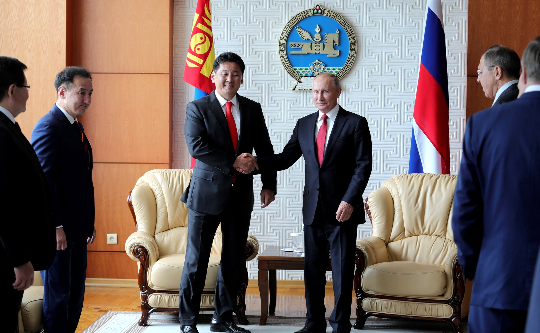 Встреча Владимира Путина с премьер-министром Монголии Ухнагийн Хурэлсухом